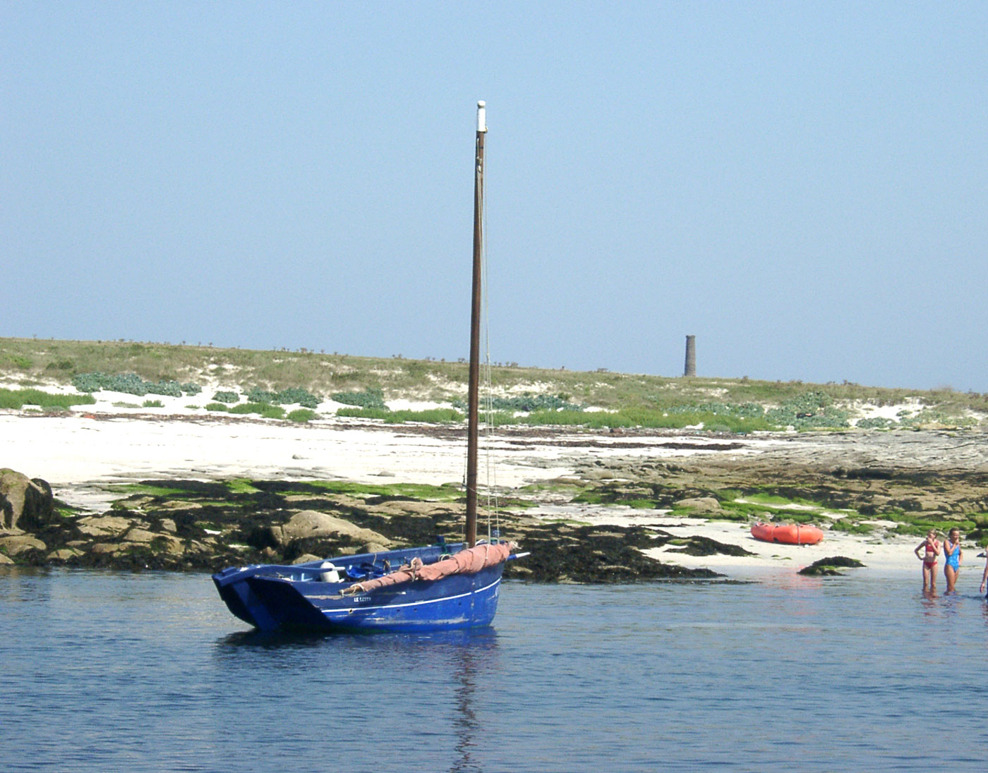 Crique à l'île du Loch dans l'archipel des Glénan, Bretagne, France